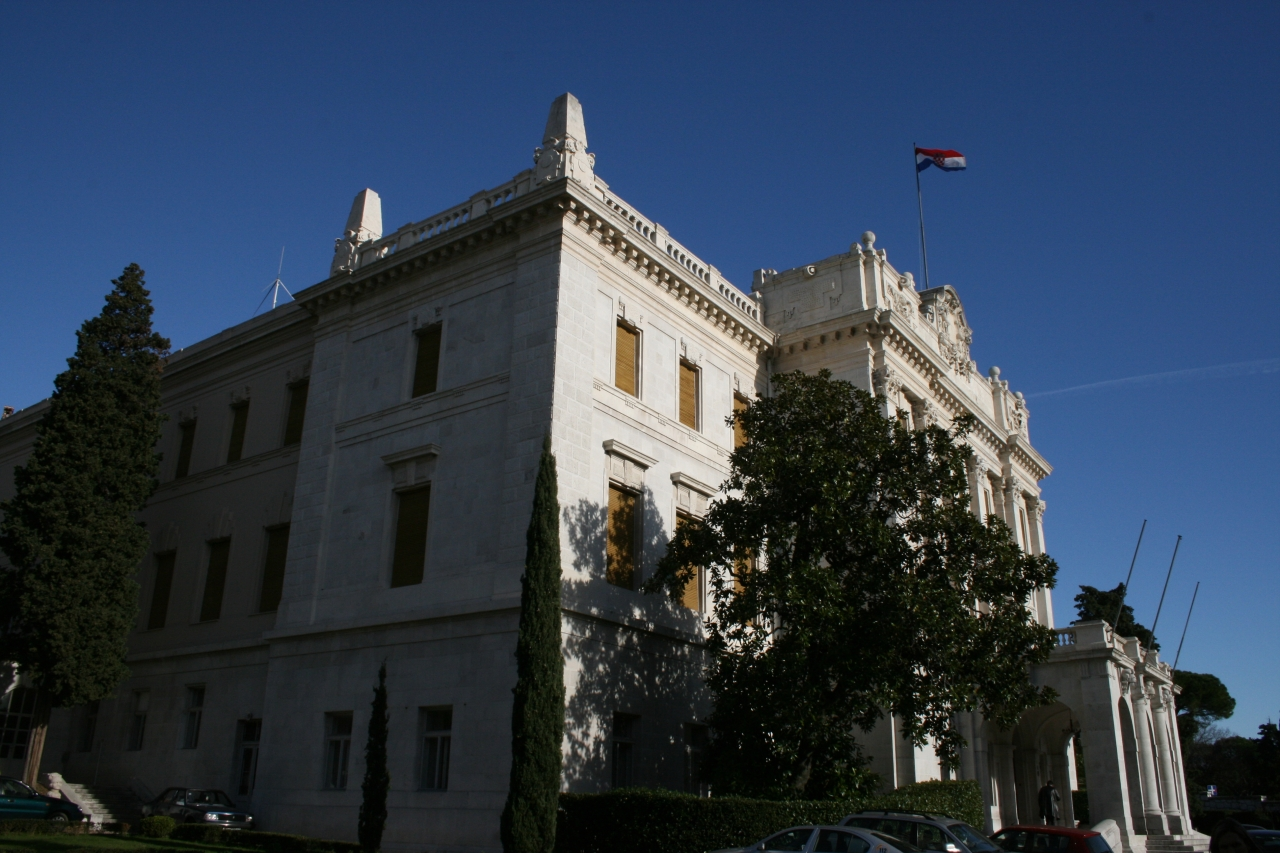 Pomorski i povijesni muzej Hrvatskog primorja u Rijeci